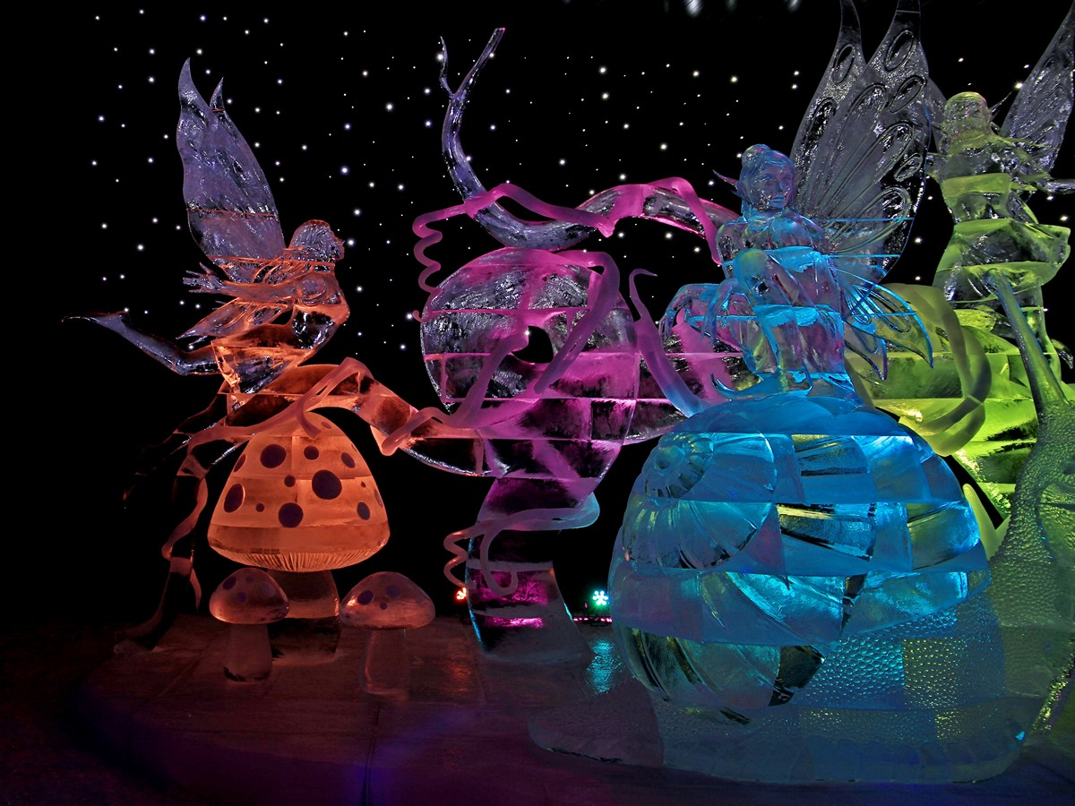 Eisschnitzereien von Munkh-Erdene Tsagaan und Baatar Dorjnamjil (Mongolei) in der 16. Eiswelt Rövershagen – Karls Erlebnis-Dorf